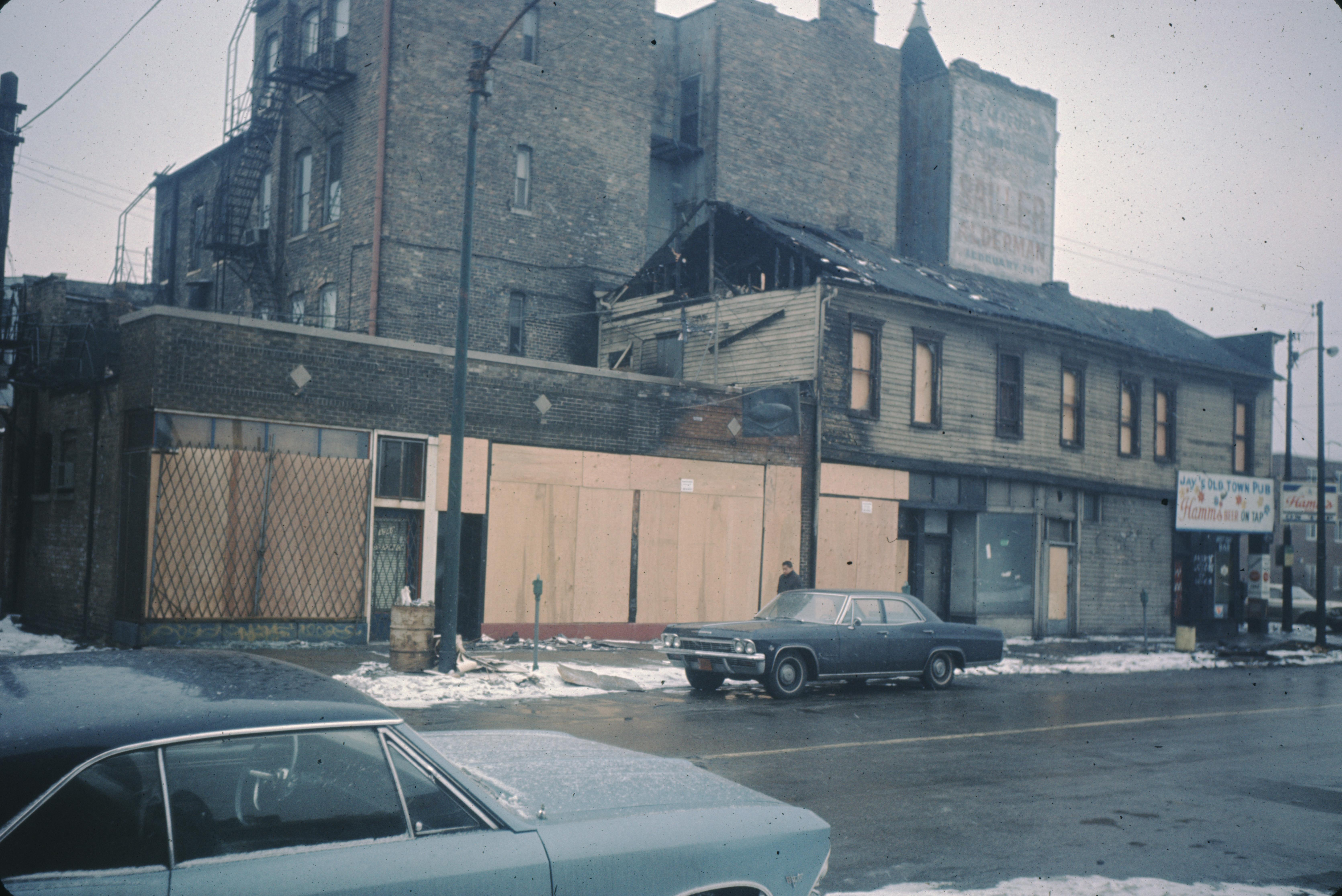 CyberViewX v5.16.55 Model Code=58 F/W Version=1.21